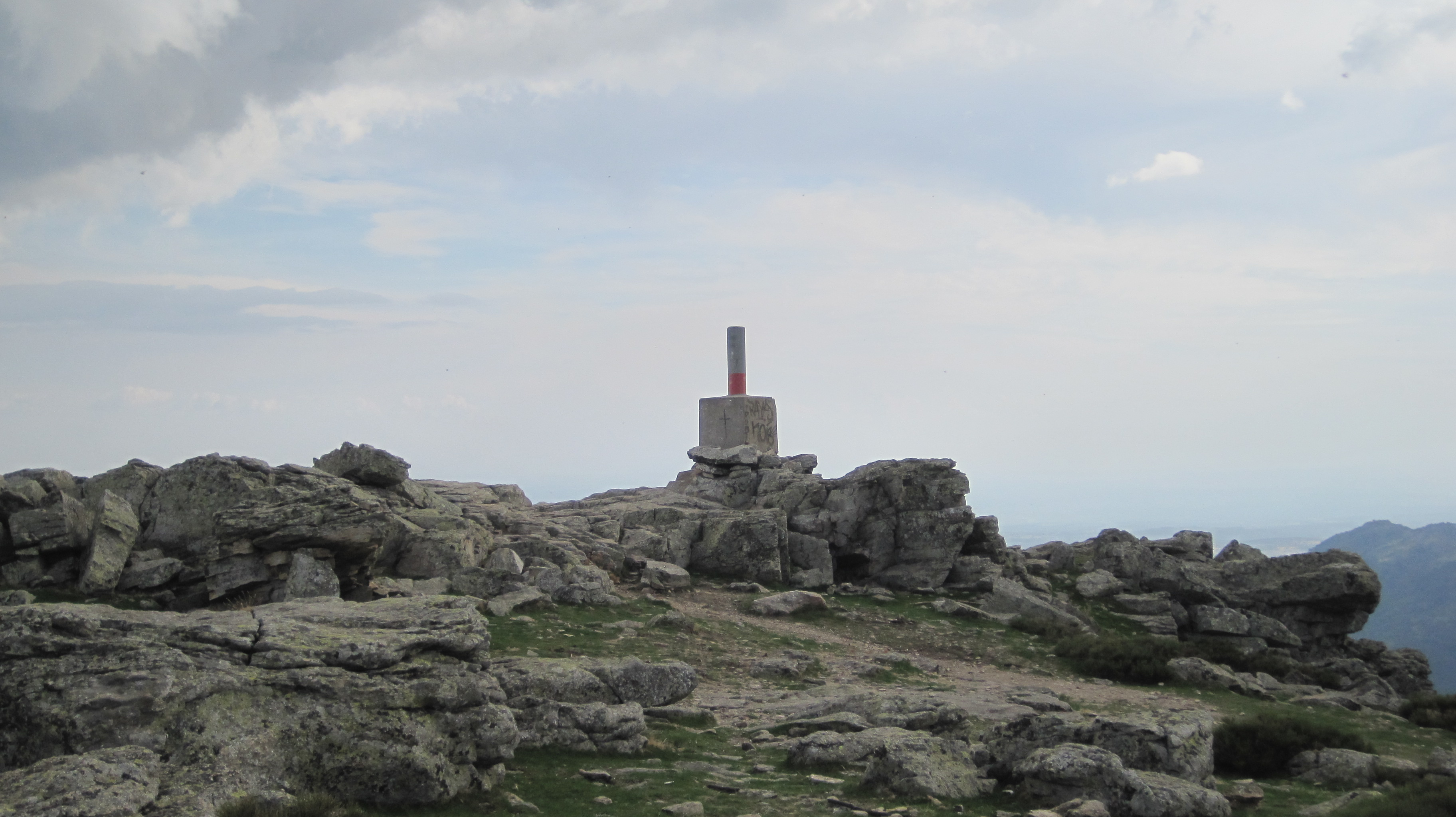 Vértice geodésico en la cima del monte Abantos. San Lorenzo de El Escorial (Madrid, España).